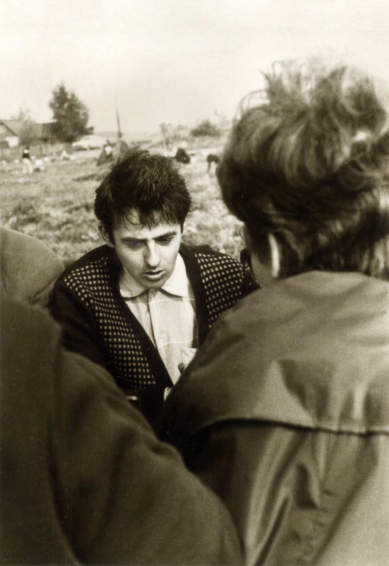 Ассистент кафедры ЛПМИ Александр Зисельсон на сельхоз работах